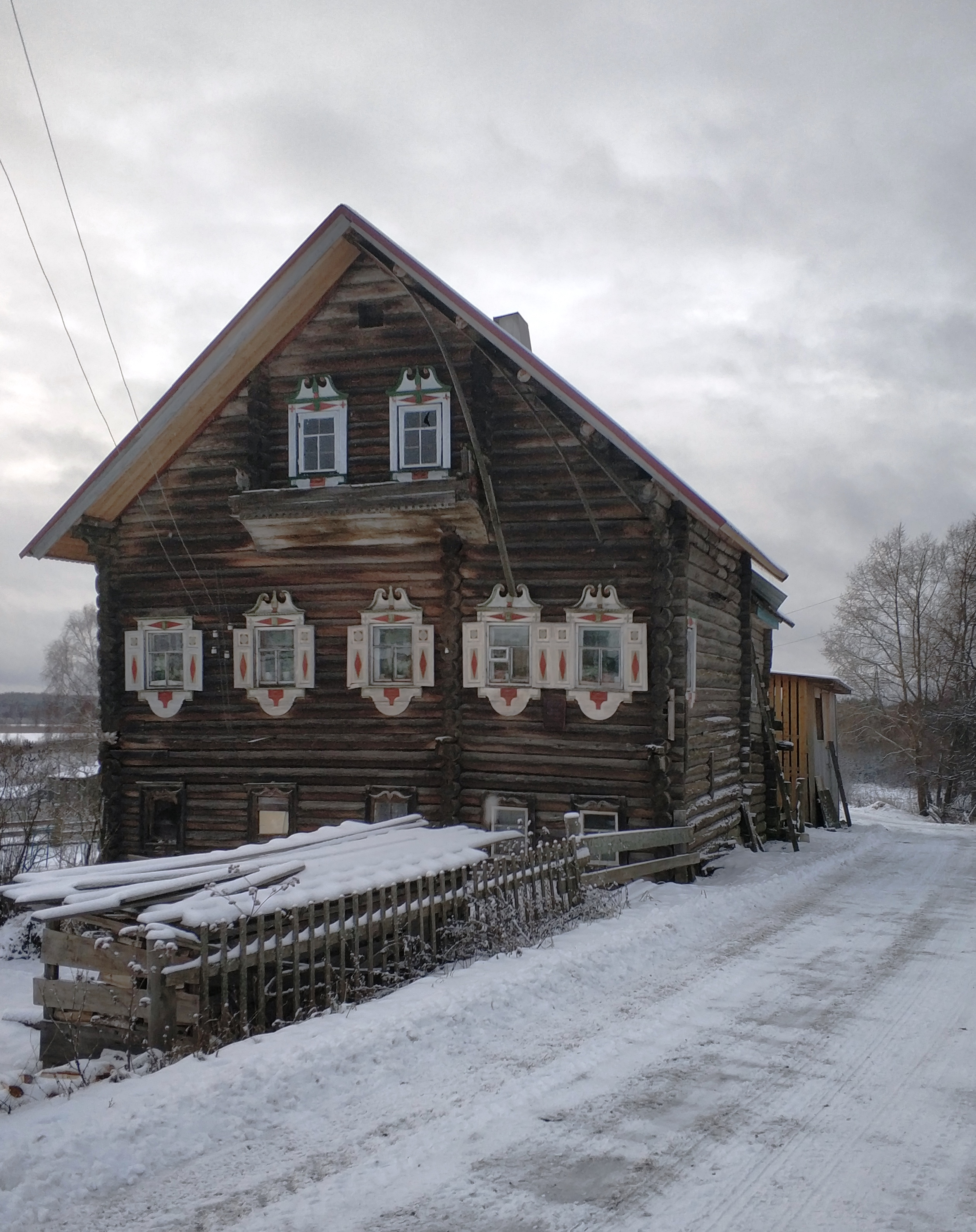 Жилой дом (село Великая Губа, Великогубское сельское поселение, Медвежьегорский район Республики Карелия).